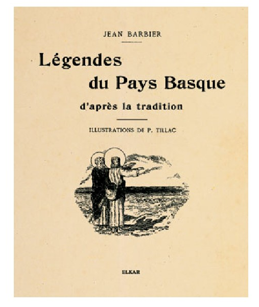 Donostian 1983an argitara emandako Jean Barbierren Légendes Basques lanaren faksimile edizioaren orrialde bat.